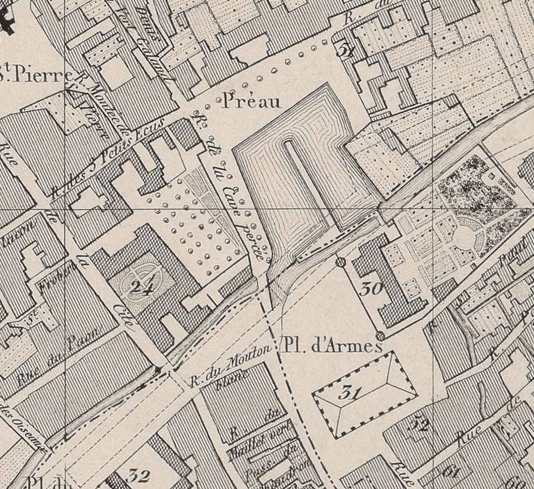 plan du centre ville